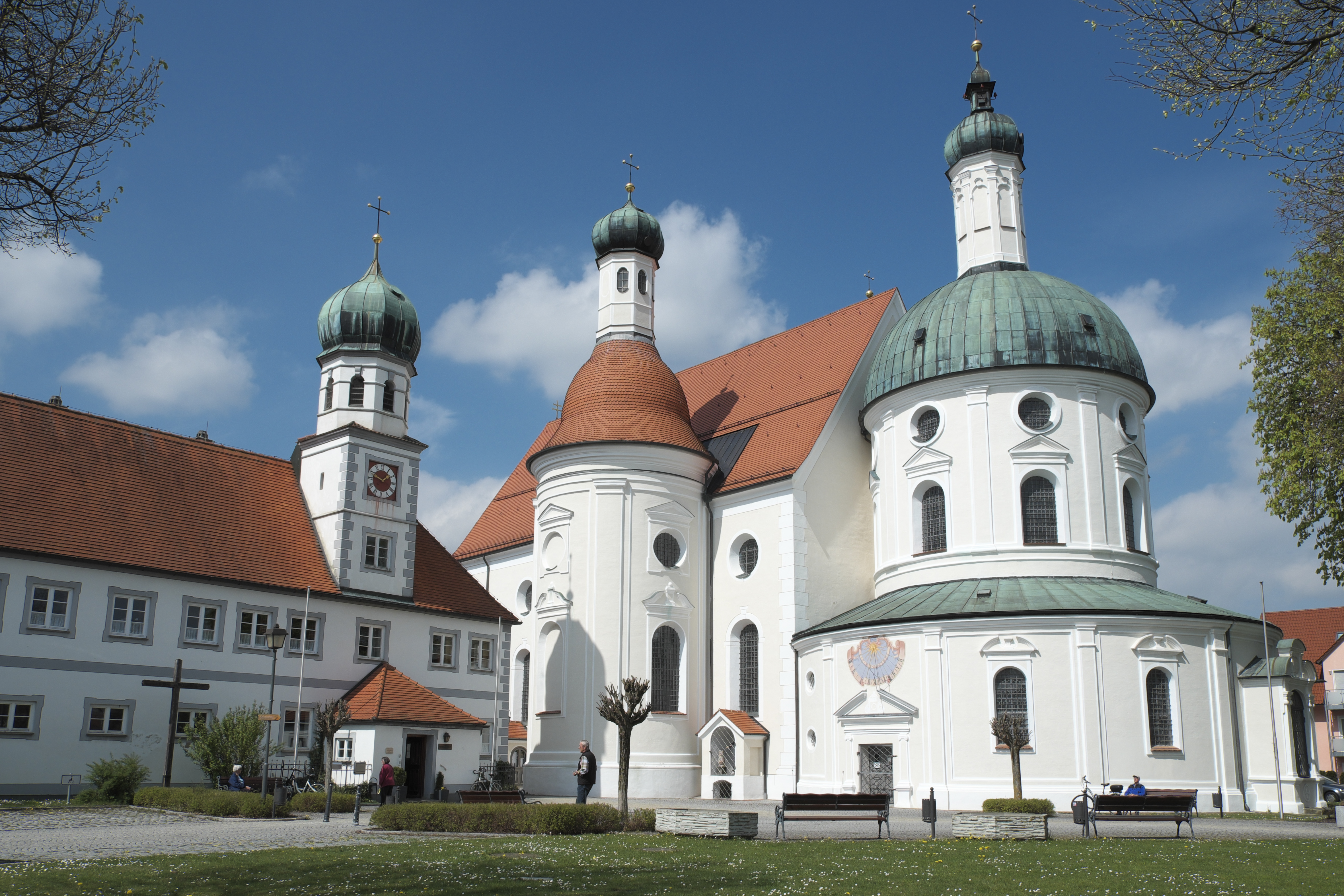 Katholische Wallfahrtskirche Maria Hilf in Klosterlechfeld im Landkreis Augsburg (Schwaben/Bayern)